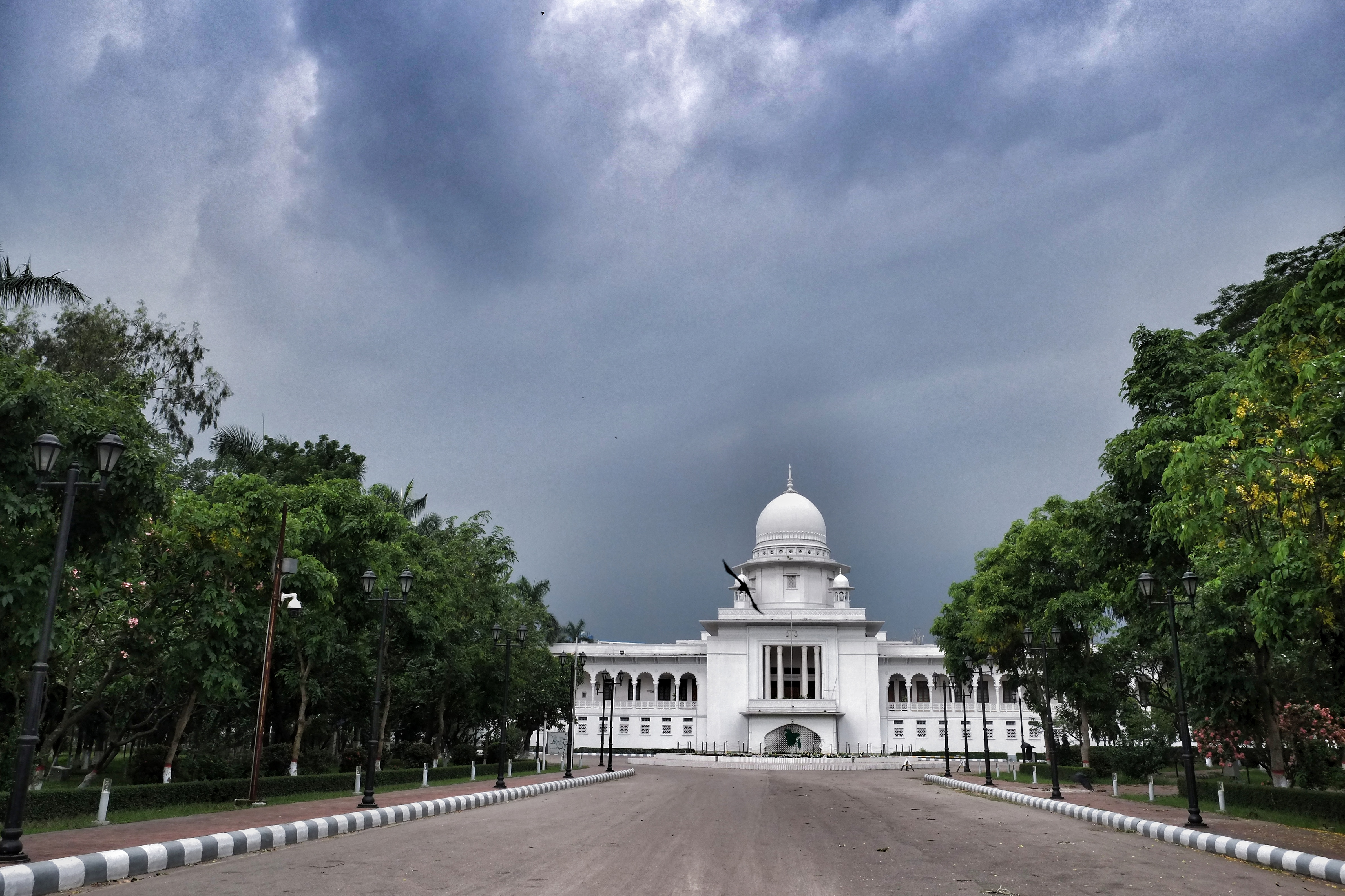 বাংলাদেশ সুপ্রীম কোর্ট বাংলাদেশ সুপ্রীম কোর্ট হচ্ছে দেশের সর্ব্বোচ্চ আদালত এবং এর বিচারকবৃন্দ প্রধান বিচারপতির সঙ্গে পরামর্শক্রমে রাষ্ট্রপতি কর্তৃক নিযু্ক্ত হয়ে থাকেন।